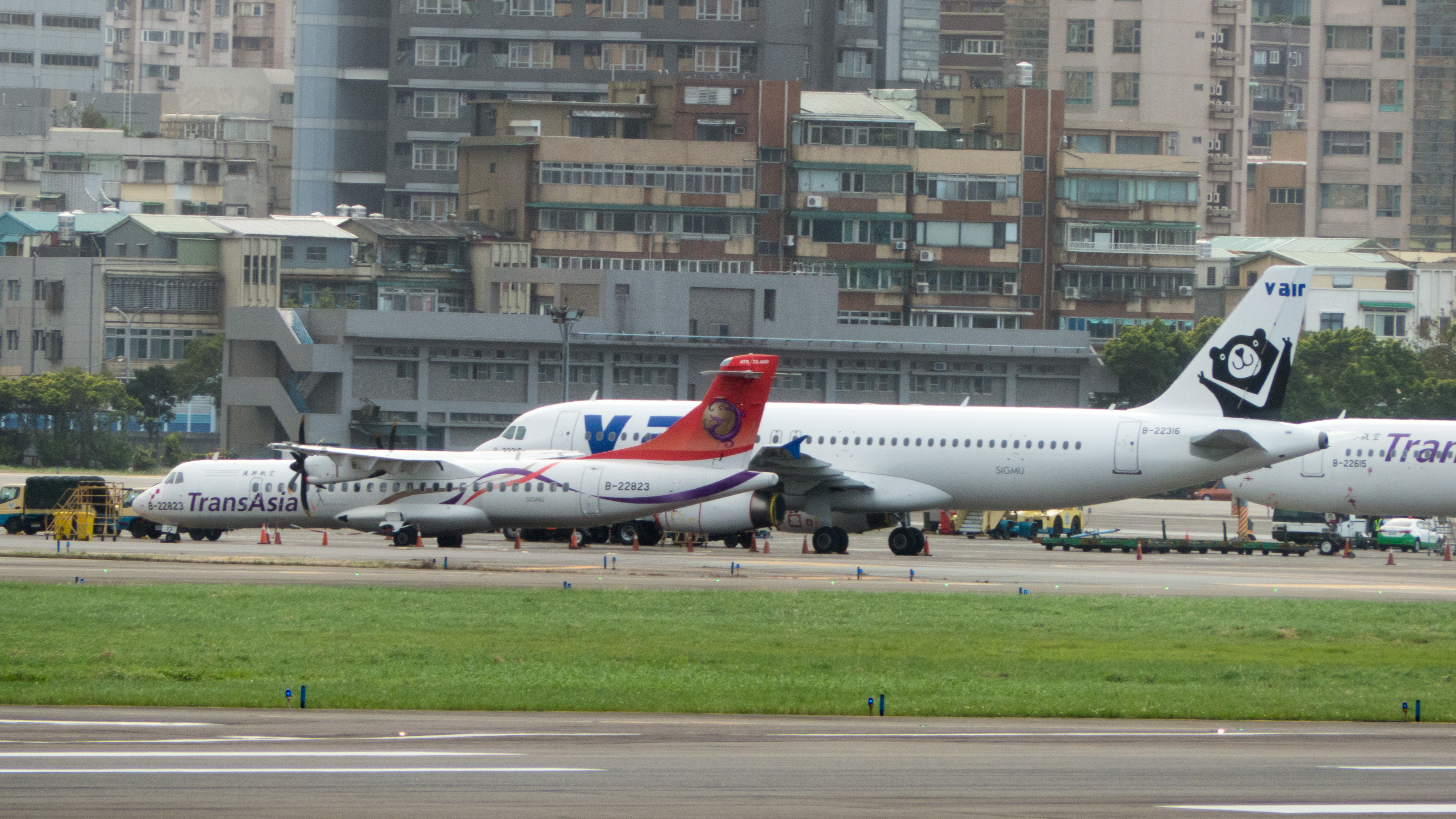 復興航空解散後，停放臺北松山機場的ATR 72-212A B-22823（左）、原威航空中巴士A320-232 B-22316（右，威航2016年10月1日停止營運後回歸復航）。